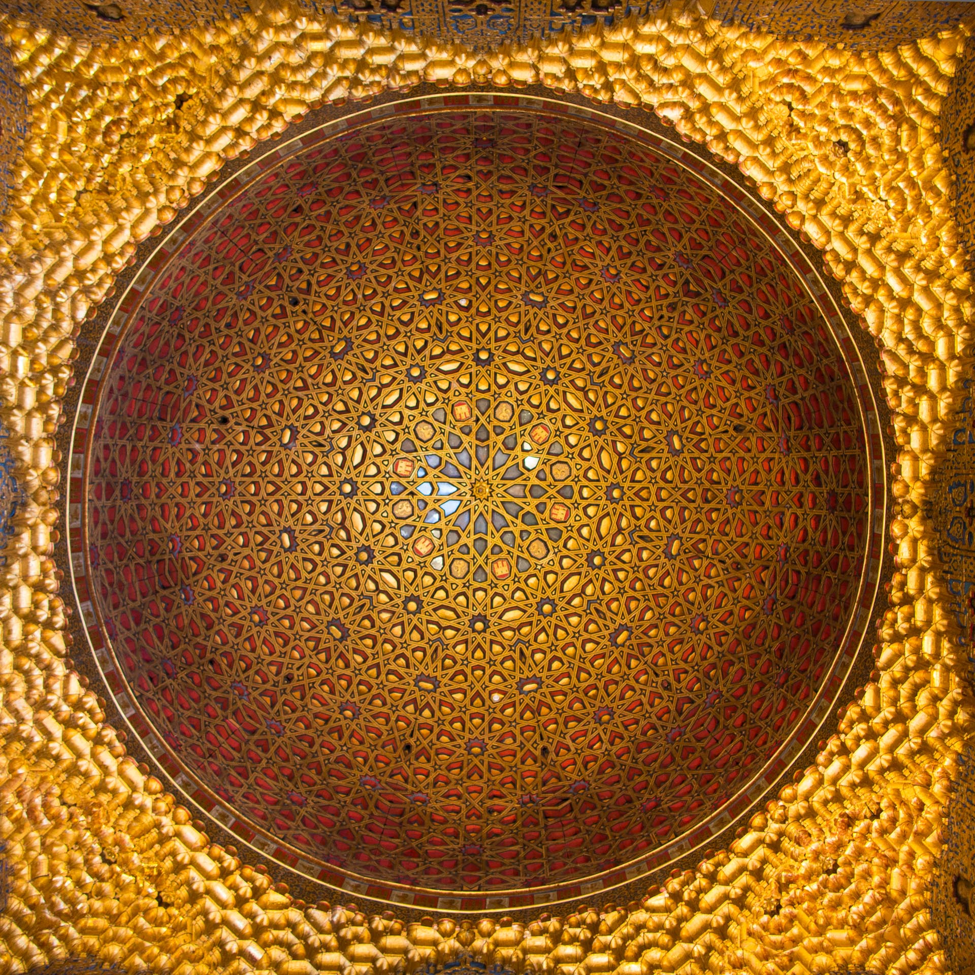 Cúpula del Salón de Embajadores de los Reales Alcázares de Sevilla